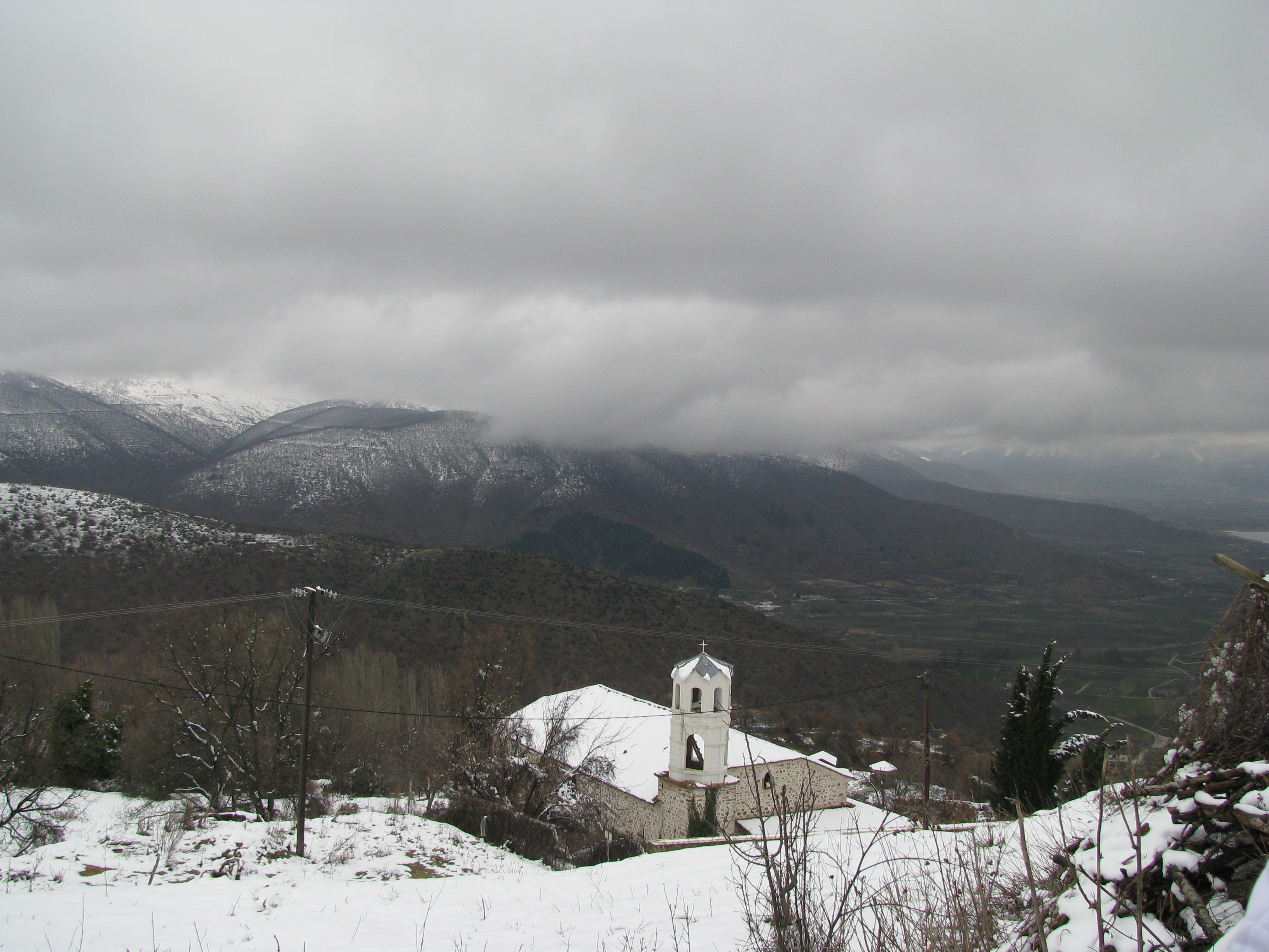 Църквата в Шестеово, Гърция.